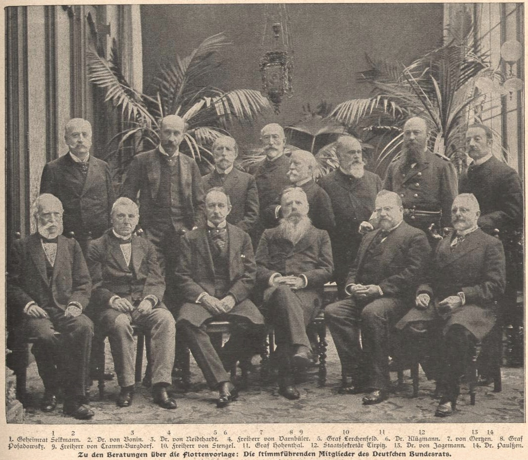 Hermann von Stengel (1837-1919) bayerischer Freiherr und Politiker im Bundesrat, Berlin, Gruppenbild